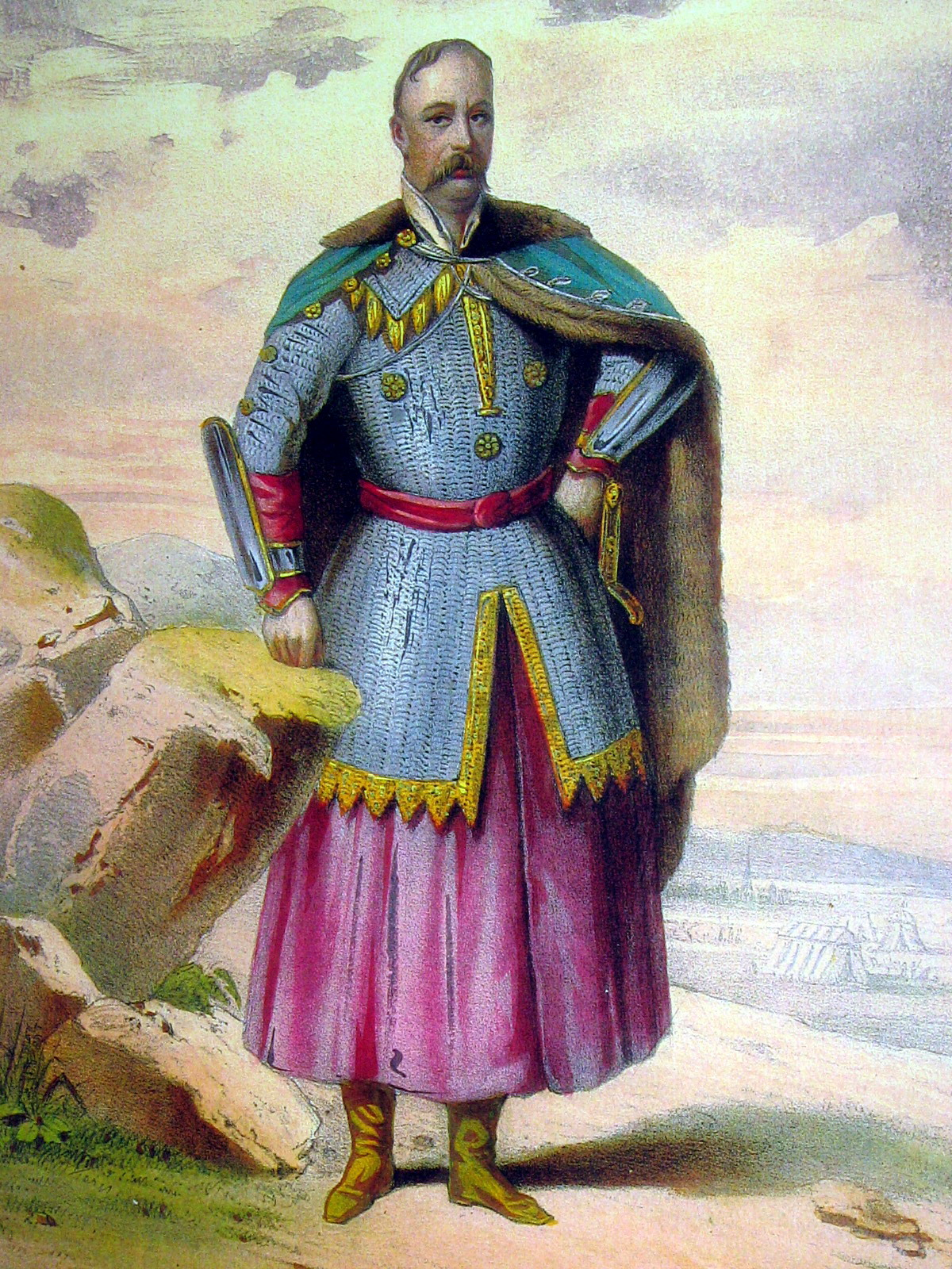 Беларуская (тарашкевіца): Партрэт Рыгора Агінскага (Ryhor Aginski). Відаць, напраўду гэта партрэт Януша Радзівіла (Januš Radzivił)